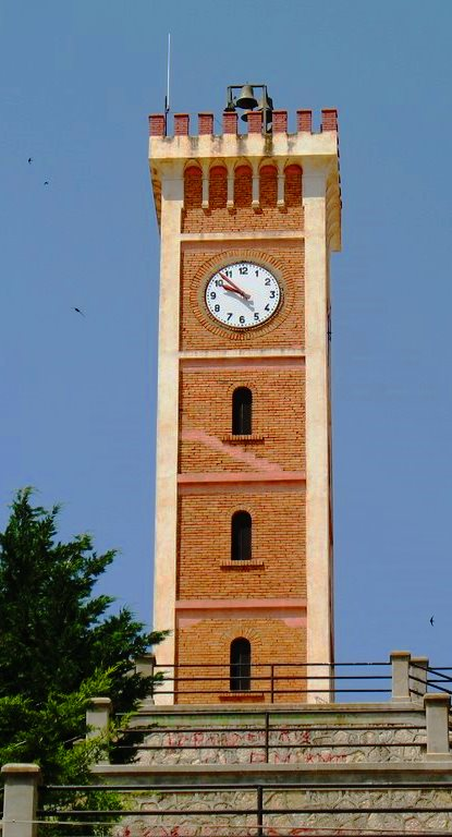 Torre civica (città di San Cataldo, provincia Caltanissetta)(1).jpg